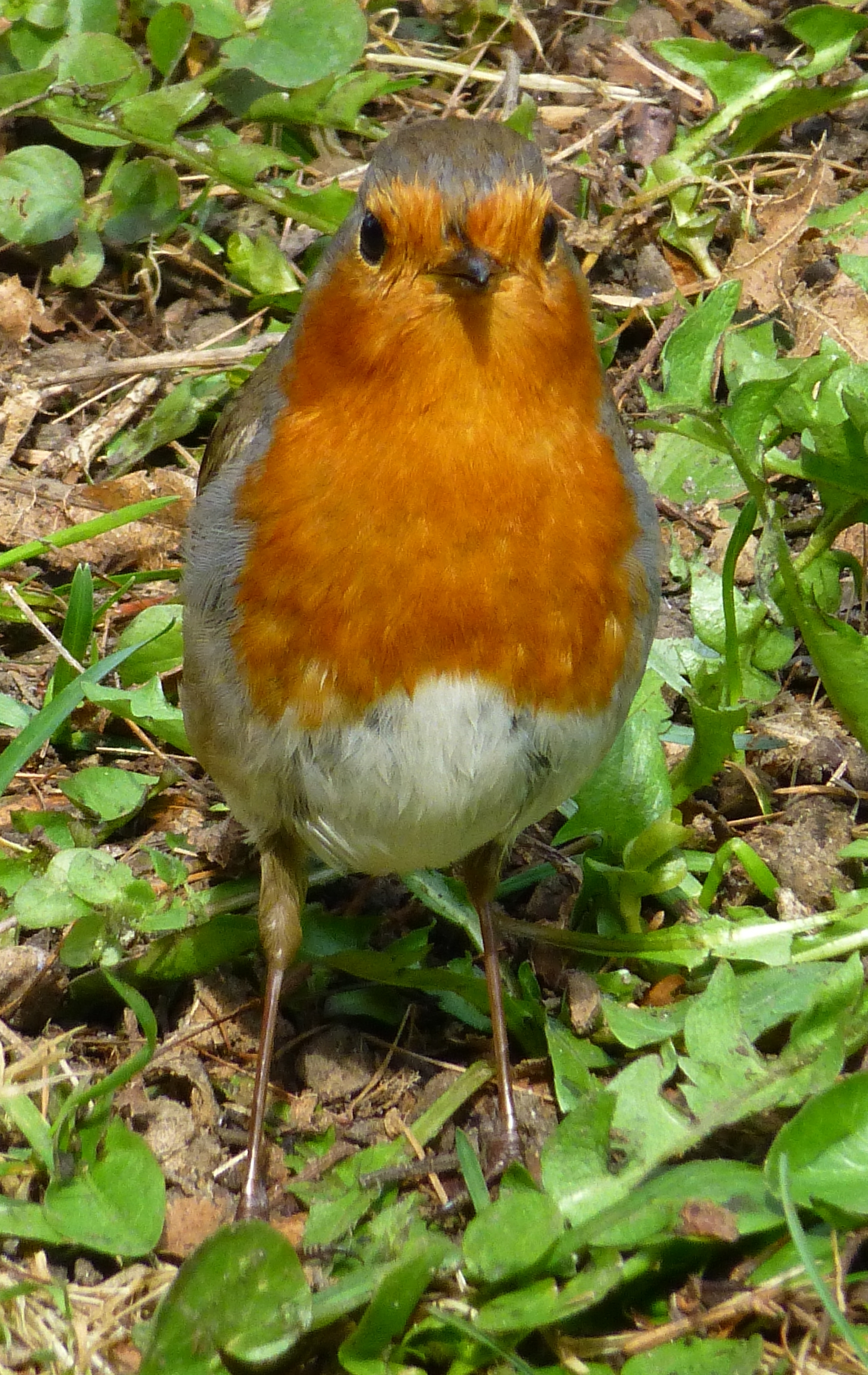 Rotkehlchen Erithacus rubecula Radeberg 6